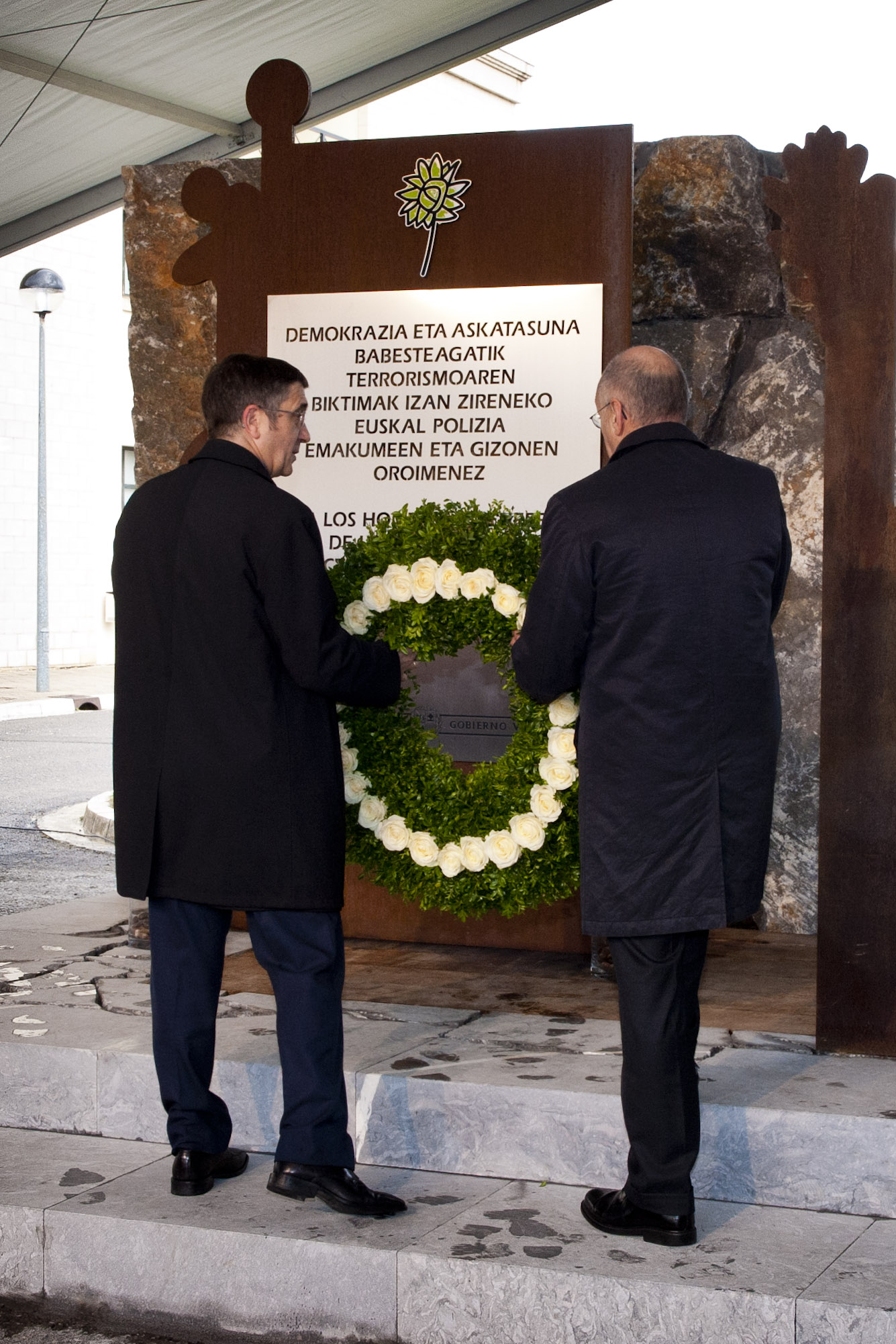 Patxi Lopez lehendakari ohia ETAk hildako ertzainak omenduz Arkautin.